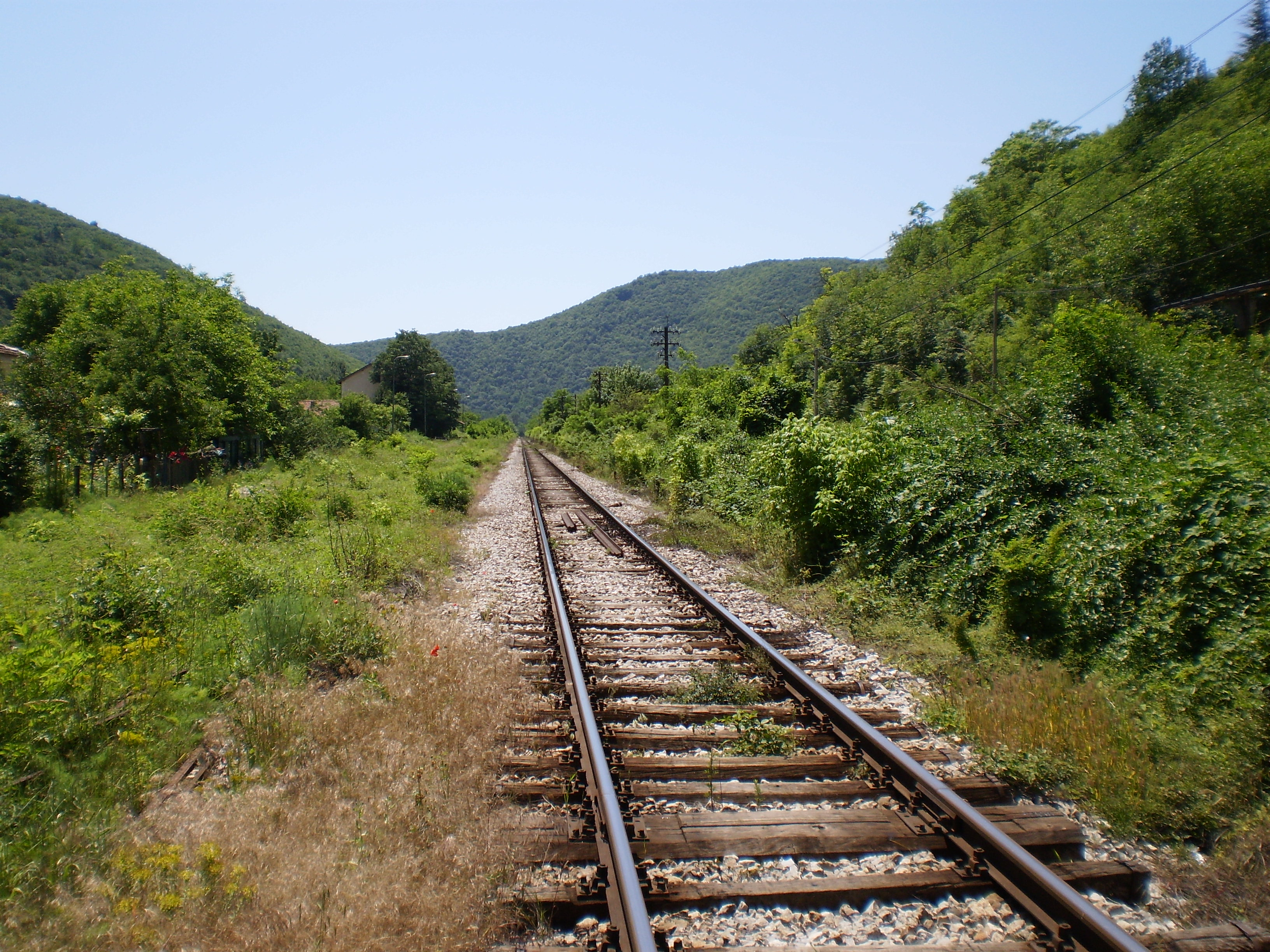 Deo železničke magistrale (London-Pariz-Beograd-Niš-Sofija-Istanbul) kroz Sićevačku klisuru. 3.6.2012